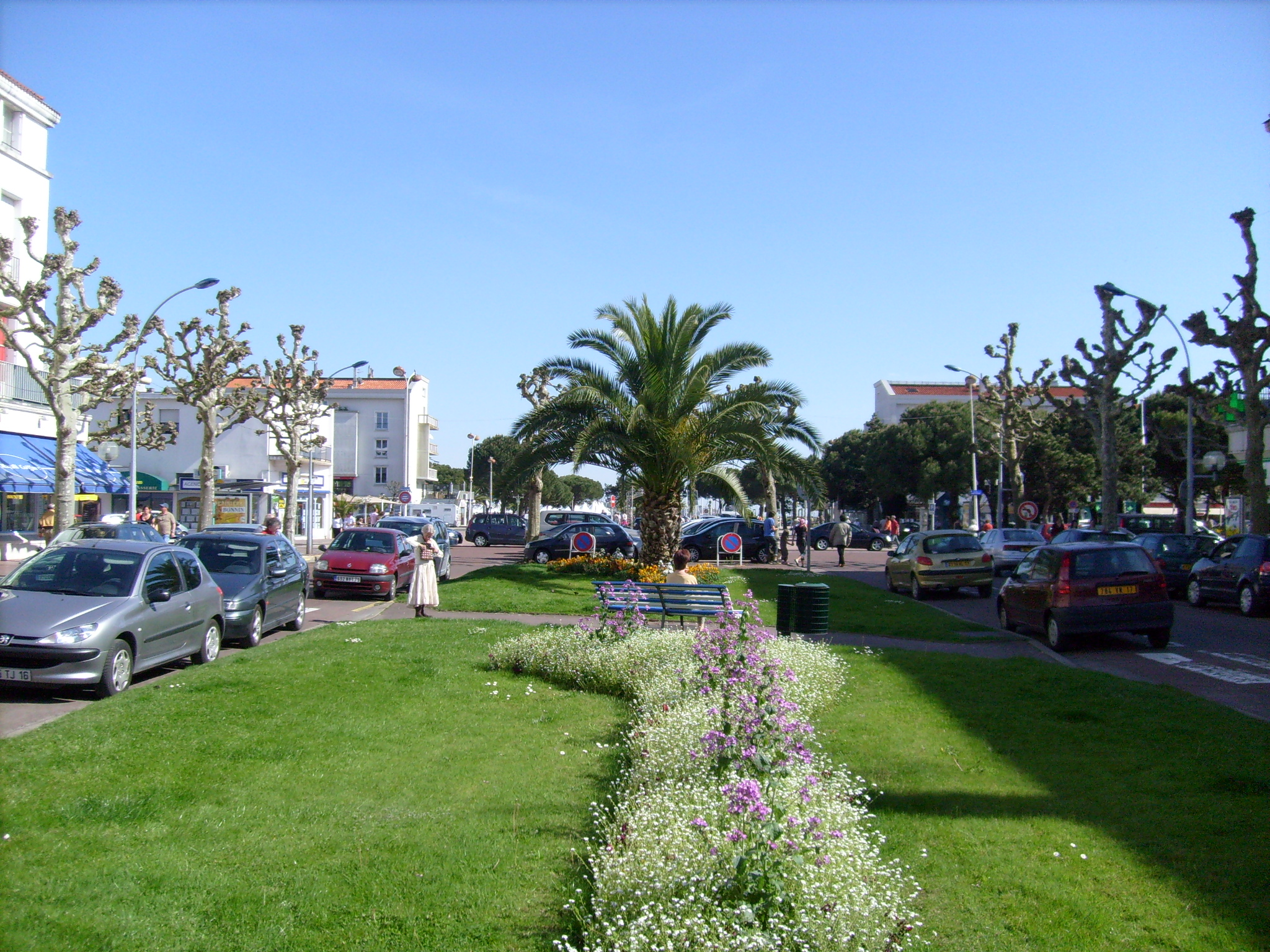 photographie de Cobber17